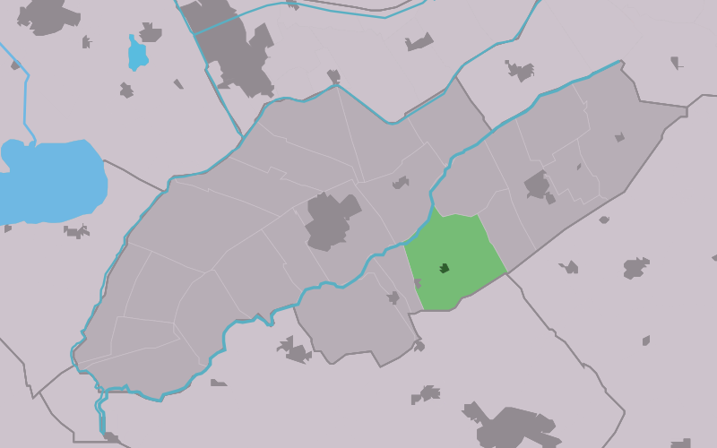 Kaartsje fan himrik fan Steggerda